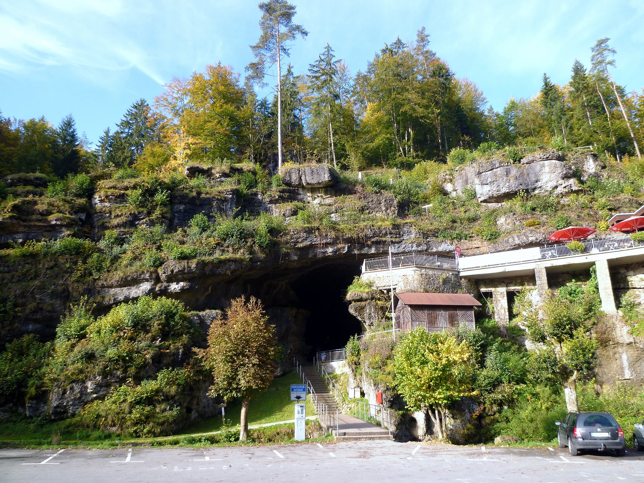 Teufelshöhle, Höhleneingang